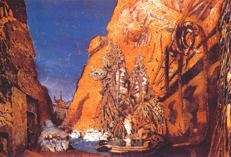 Эскиз для постановки *Синий бог* Райнальдо Гана. 1912 Centre Georges Pompidou